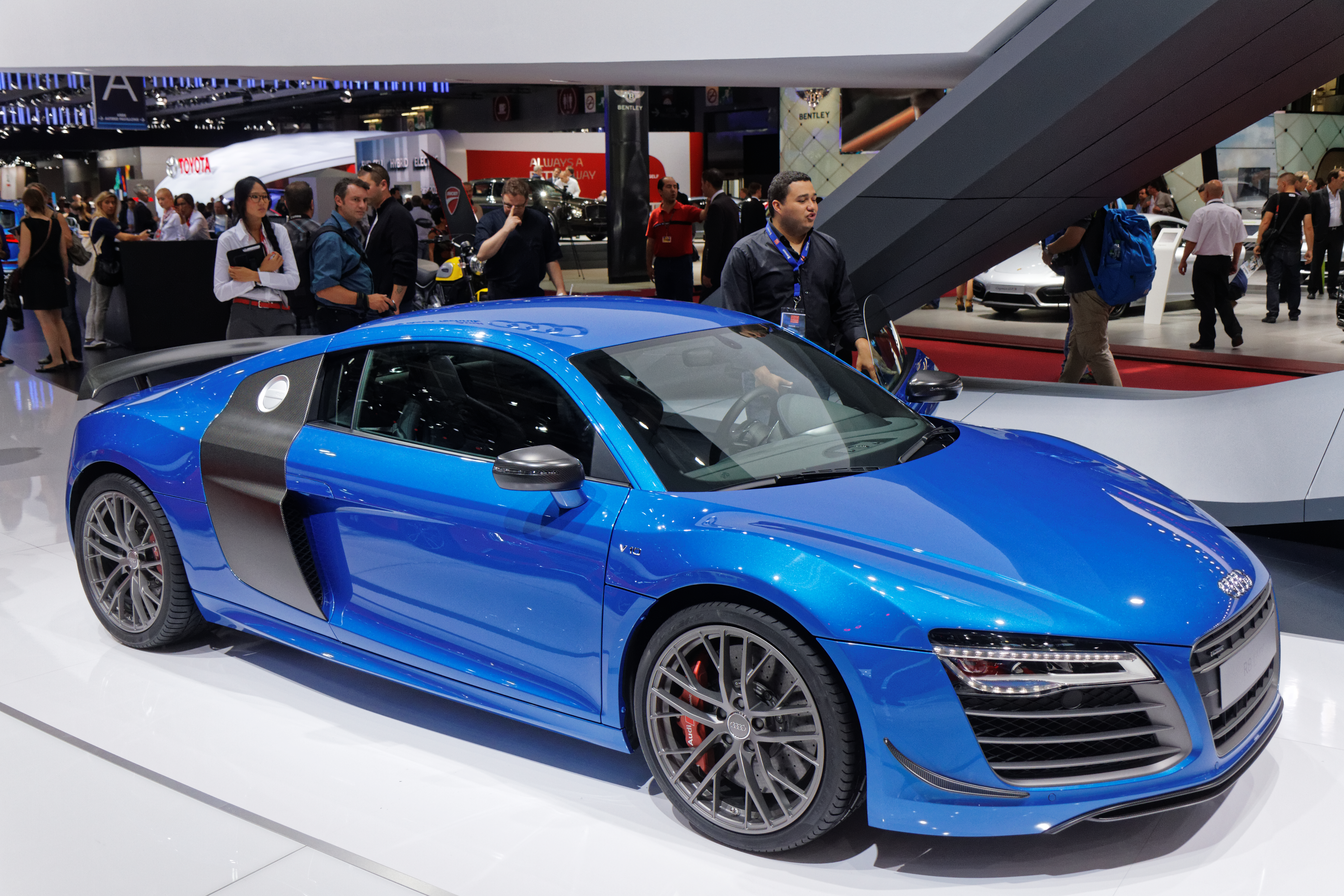 Une Audi R8 LMX présentée lors du mondial de l'automobile de Paris 2014.